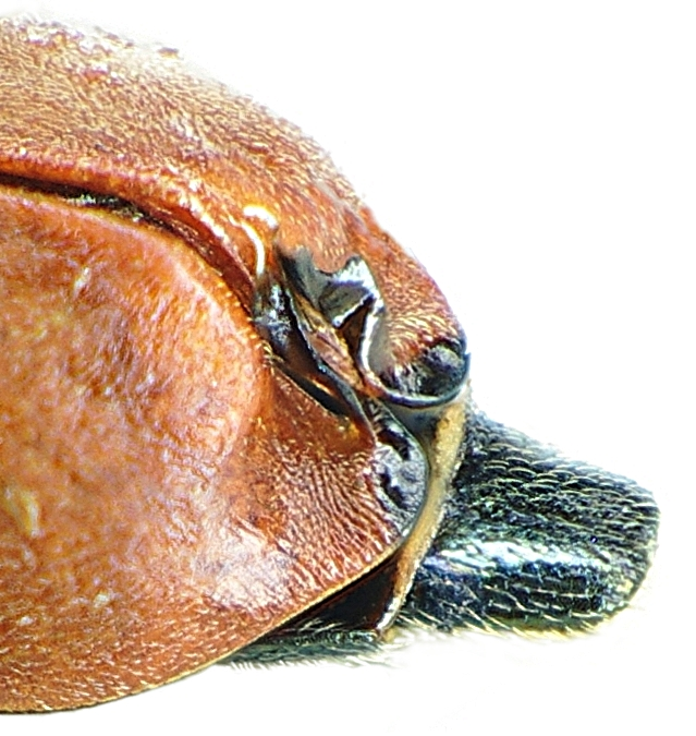 Excitator von Anthocomus coccineus aus Ungarn, getrocknetes Material, deswegen geschrumpft